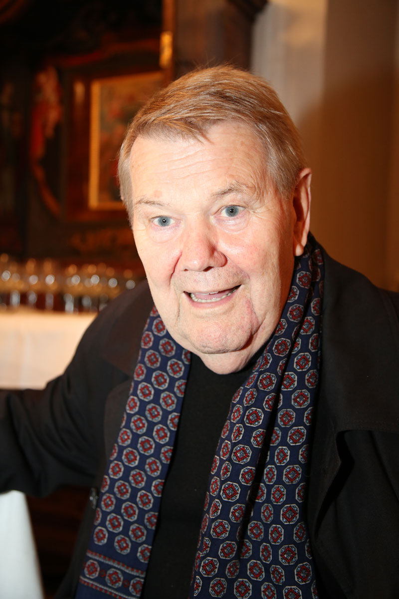 Rudolf Buczolich-1559